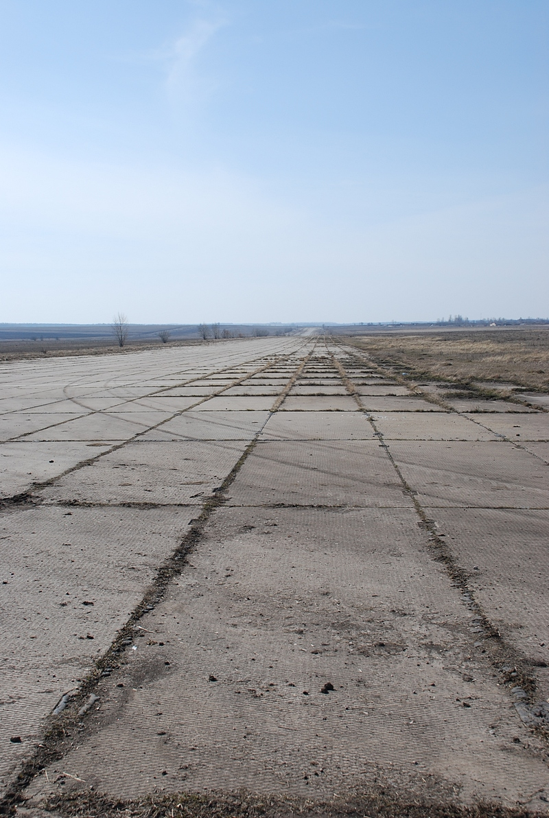 ВПП военного аэродрома Ефремов-3